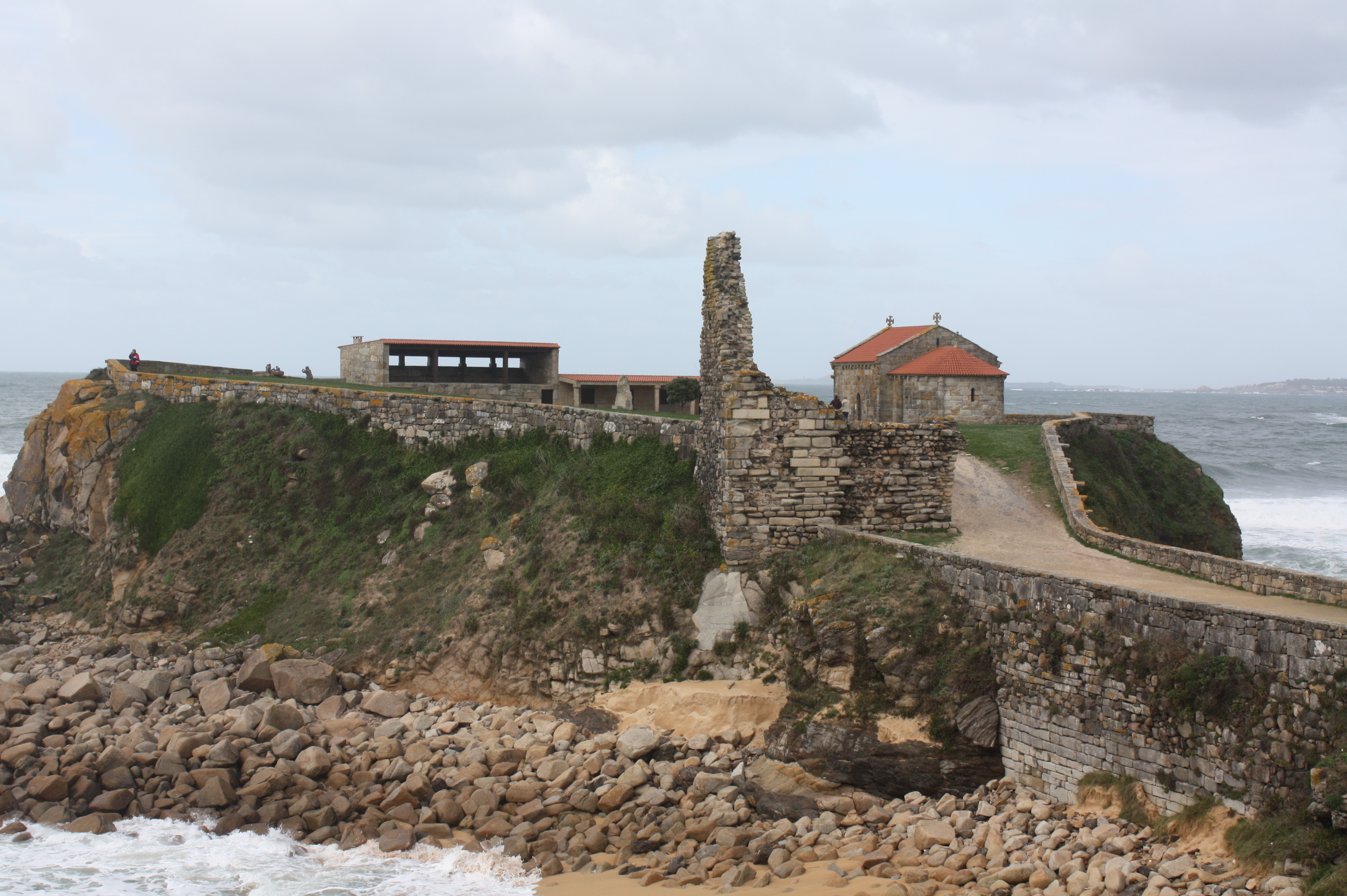 Vista xeral da ermida da Lanzada, a torre e os edificios anexos